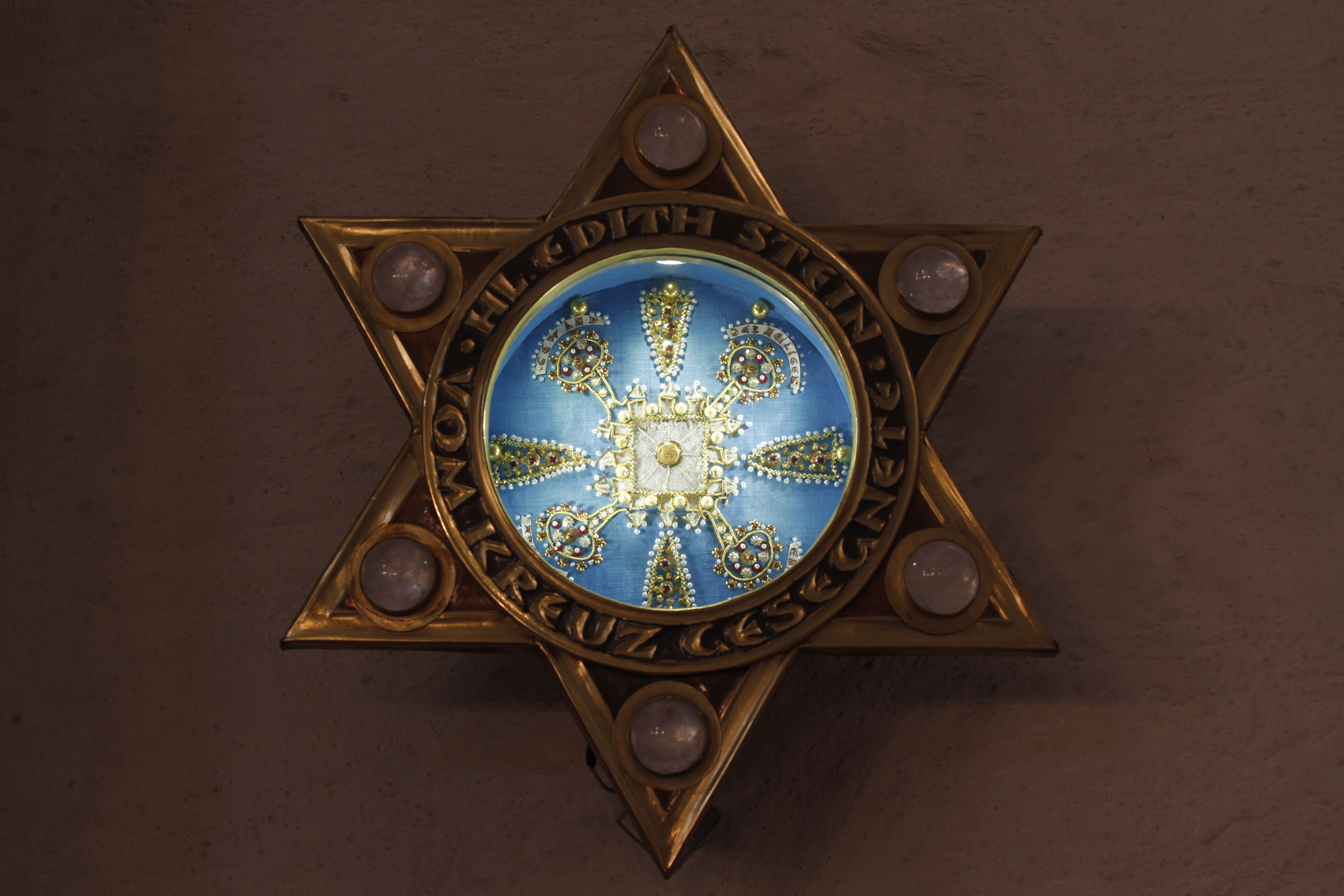 Speyer Cathedral - Speyer - Germany